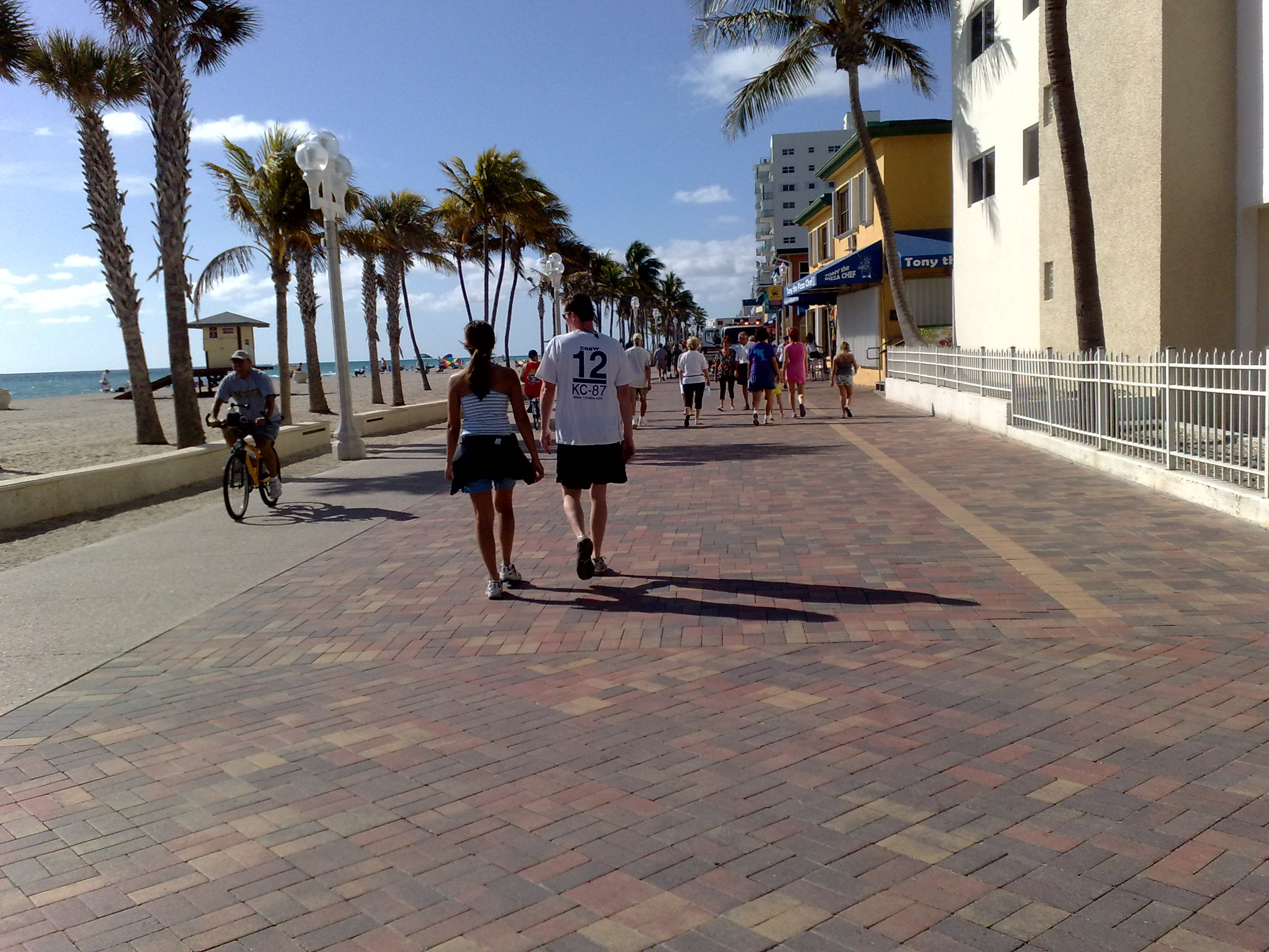 Hollywood Beach boardwalk